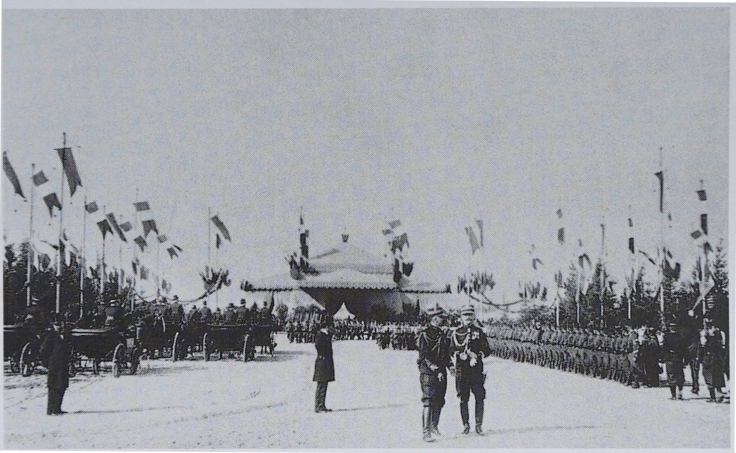 Gare du Fresnois sur la ligne Reims-Laon, gare provisoire construite en septembre 1901 par le génie et les chemins de fer de l'est.Grandes manoeuvres de l'est. Revue de Bétheny. Attente sur l'esplanade de la gare du Fresnois de l'arrivée de Nicolas II et de son épouse, le 21 septembre 1901.